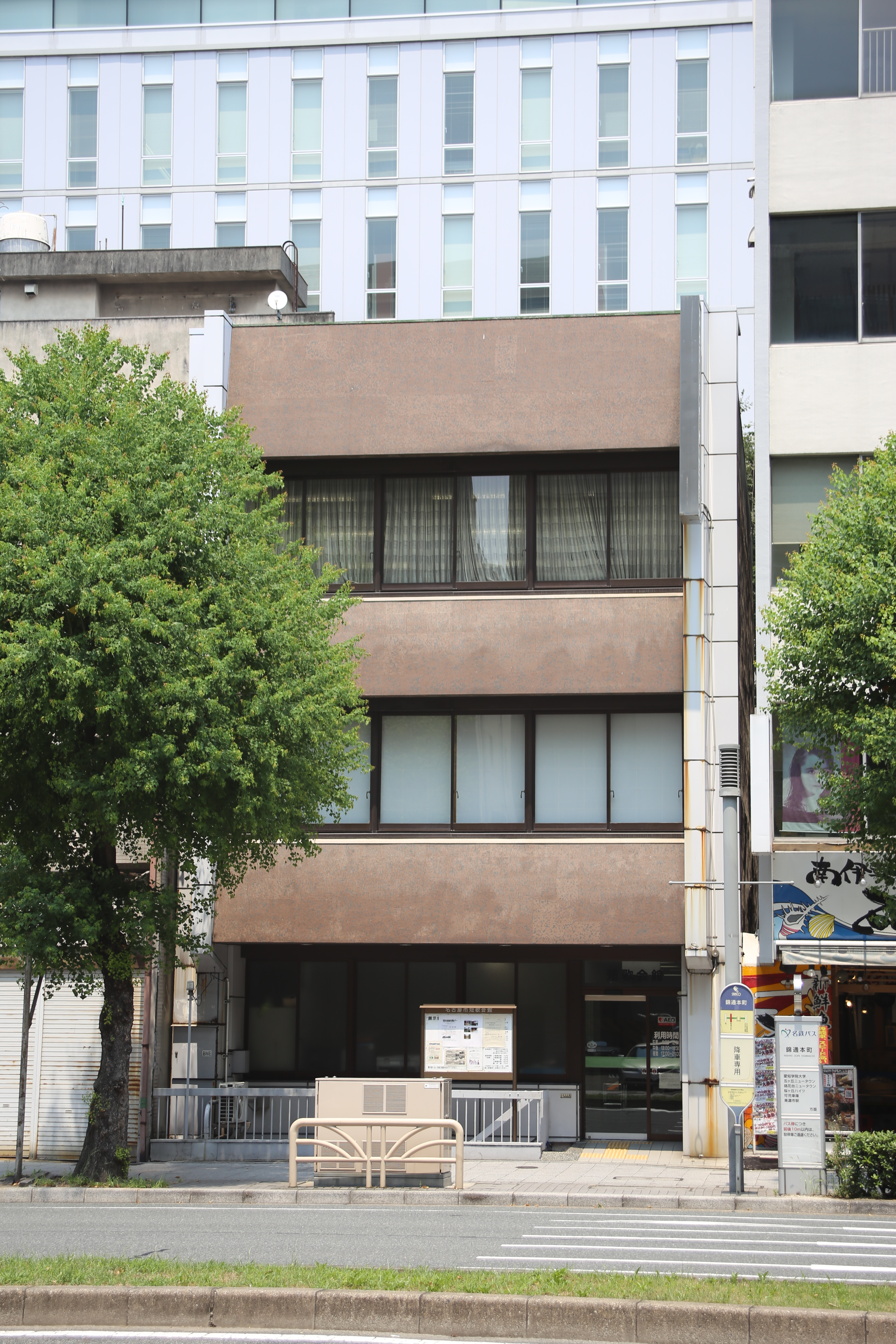 名古屋市中区錦二丁目の名古屋市短歌会館を南側公道より撮影